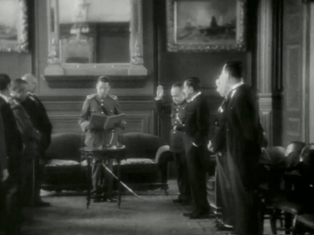 El General Martinez Dando Las Credenciales al Embajador Italiano